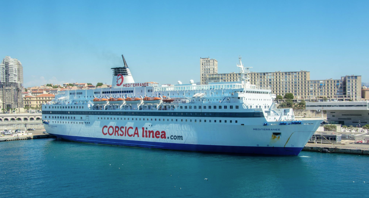 Méditerranée